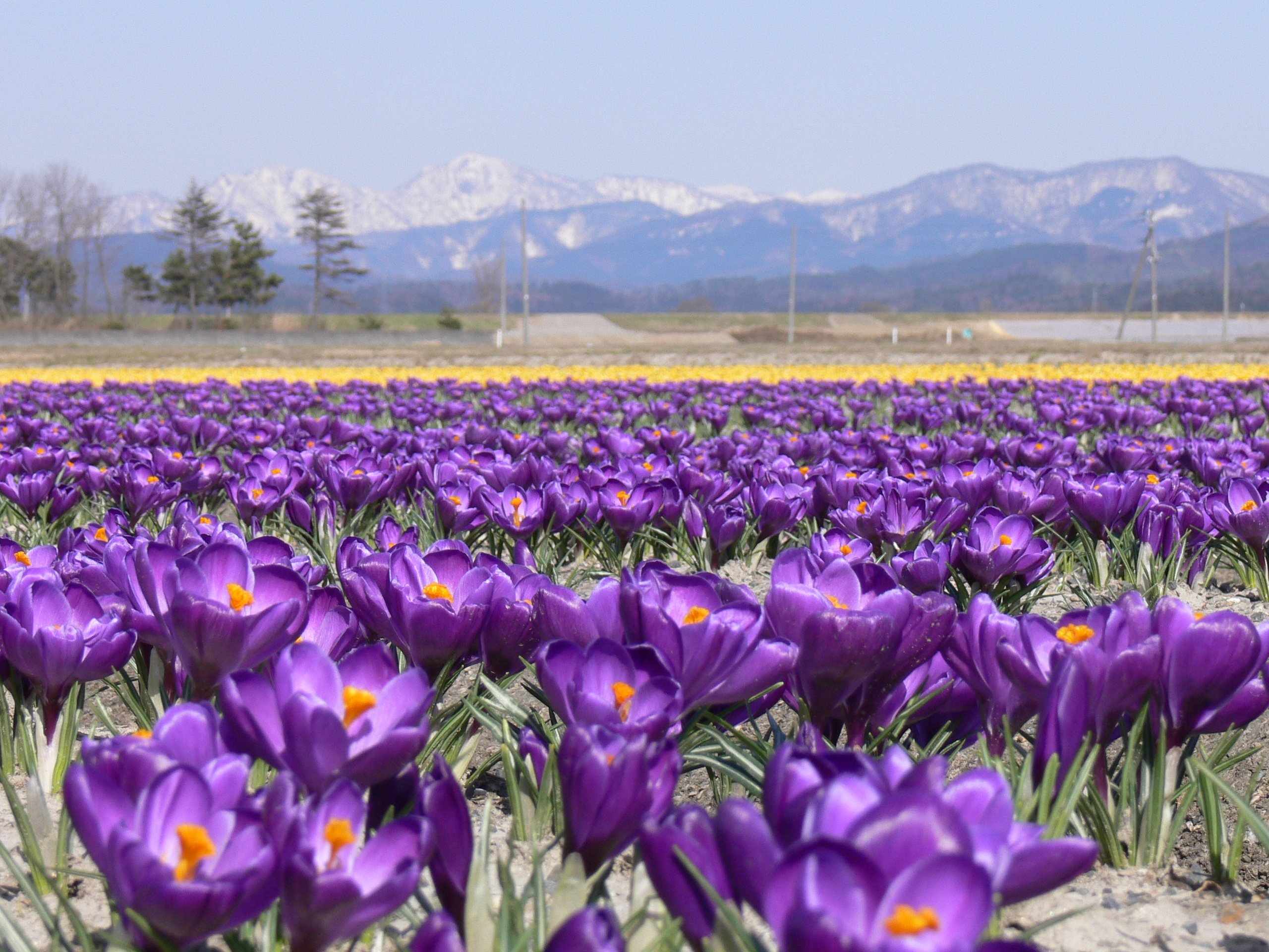 荒川から太平山